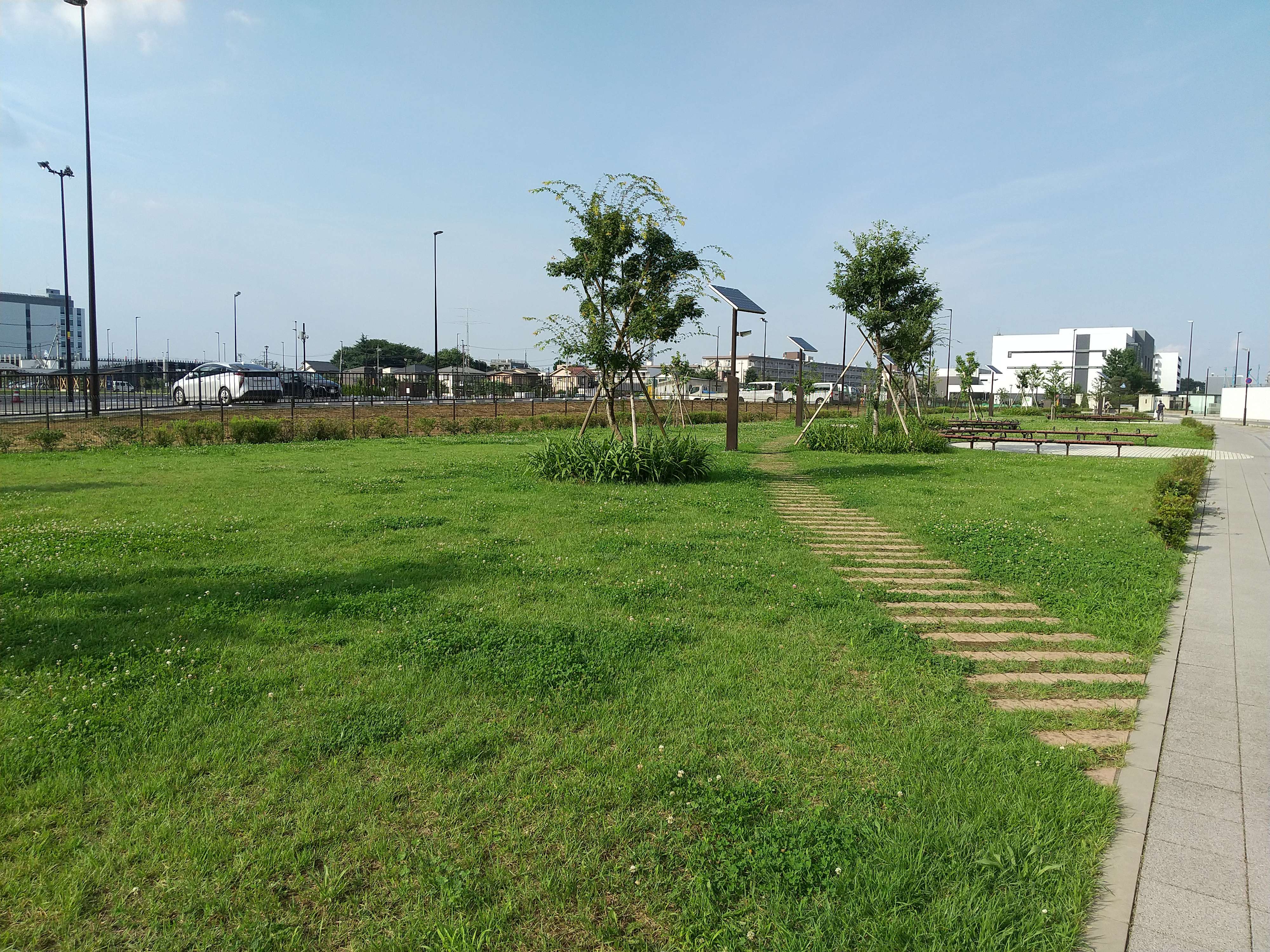 2020年8月撮影 新都心みどり広場